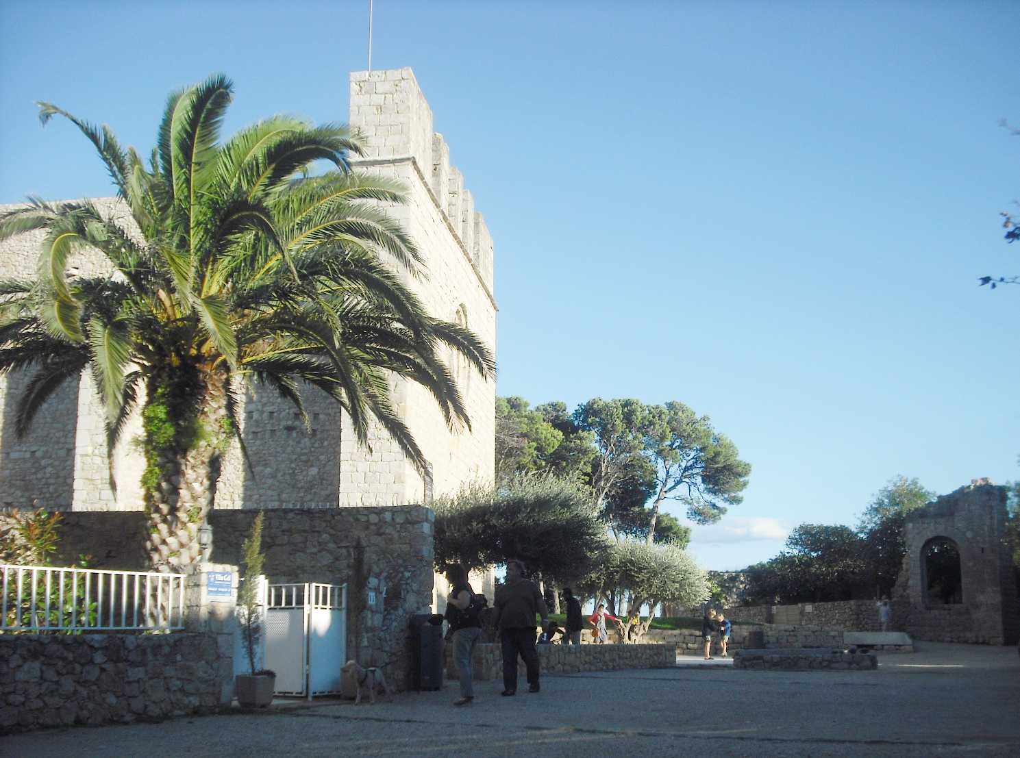 Sant Martí d'Empúries. Plaça Major (modificat)